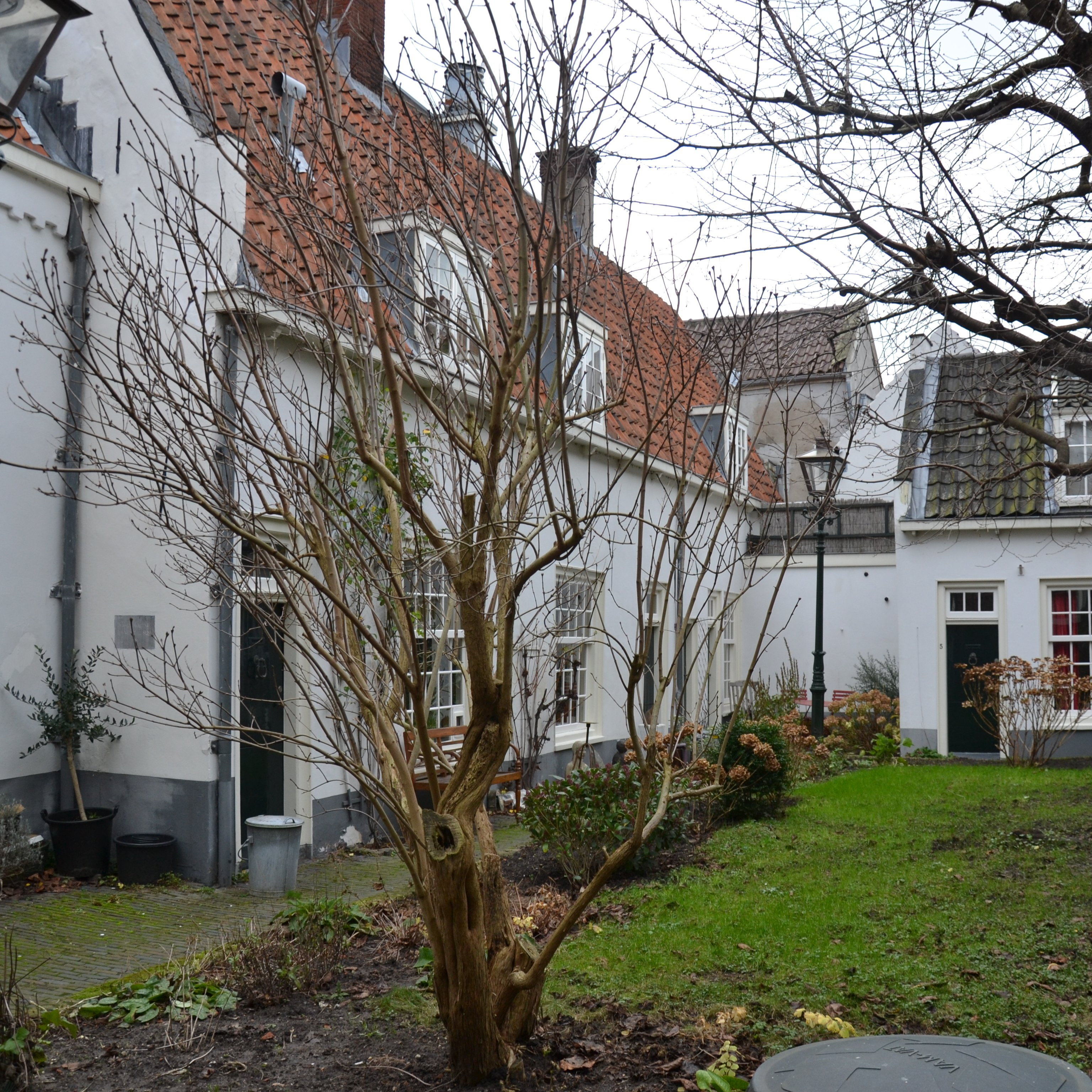 Het rijksmonument Hooglandse Kerkgracht 38 in Leiden, beter bekend als het Mierennesthofje